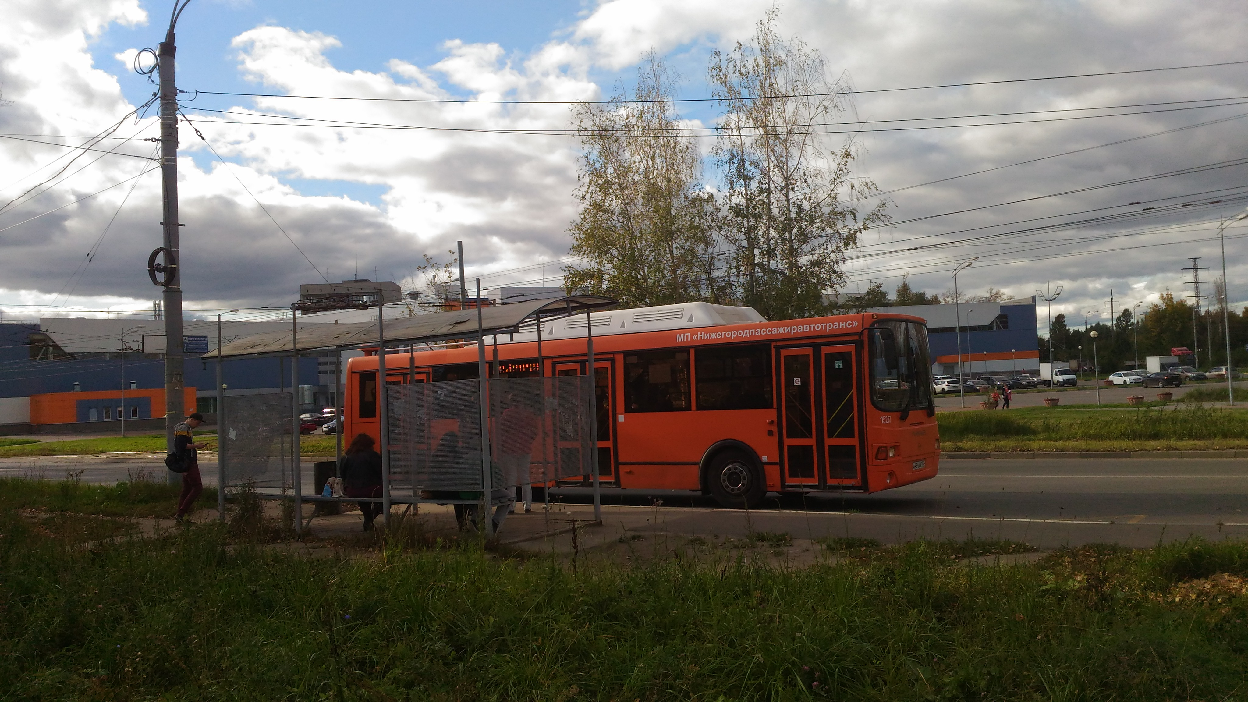 Нижний Новгород. Автобус №65 на остановке "Сормовский ПКиО"